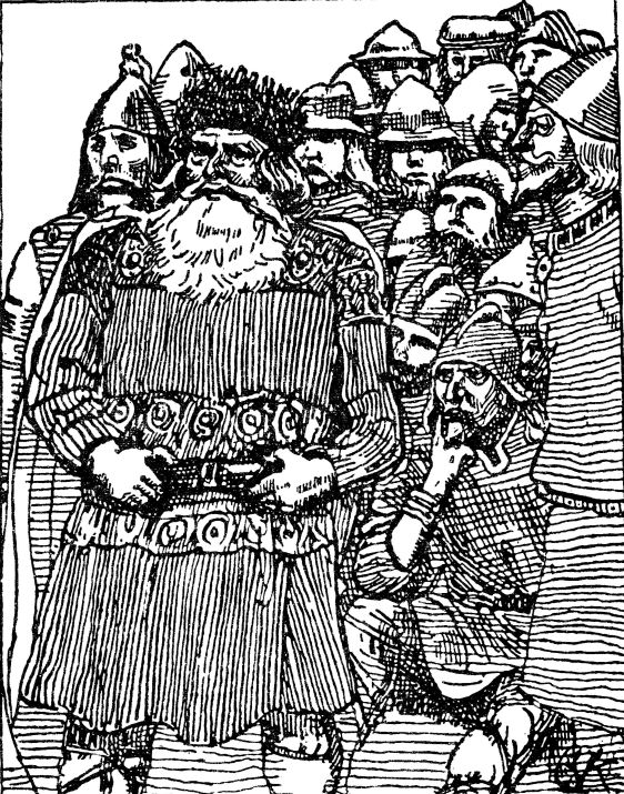 Christian Krogh: Illustration for Håkon den godes saga, Heimskringla 1899-edition. nn: «Asbjørn frå Medalhus svarar kongen.» nb: «Asbjørn fra Medalhus svarer kongen.»